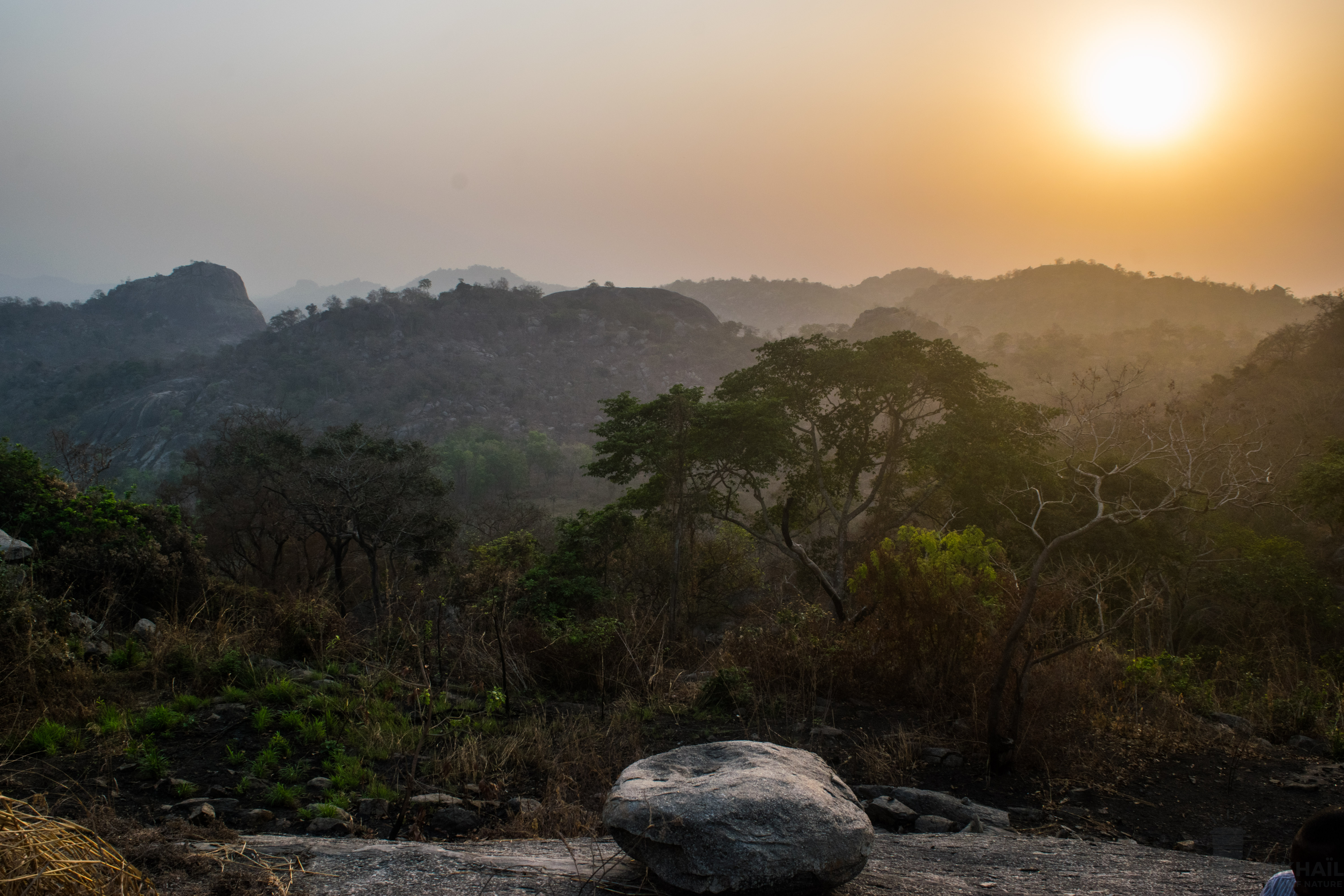 Couchée de soleil sur les collines de Kamaté Shakaloké à Glazoué au Bénin